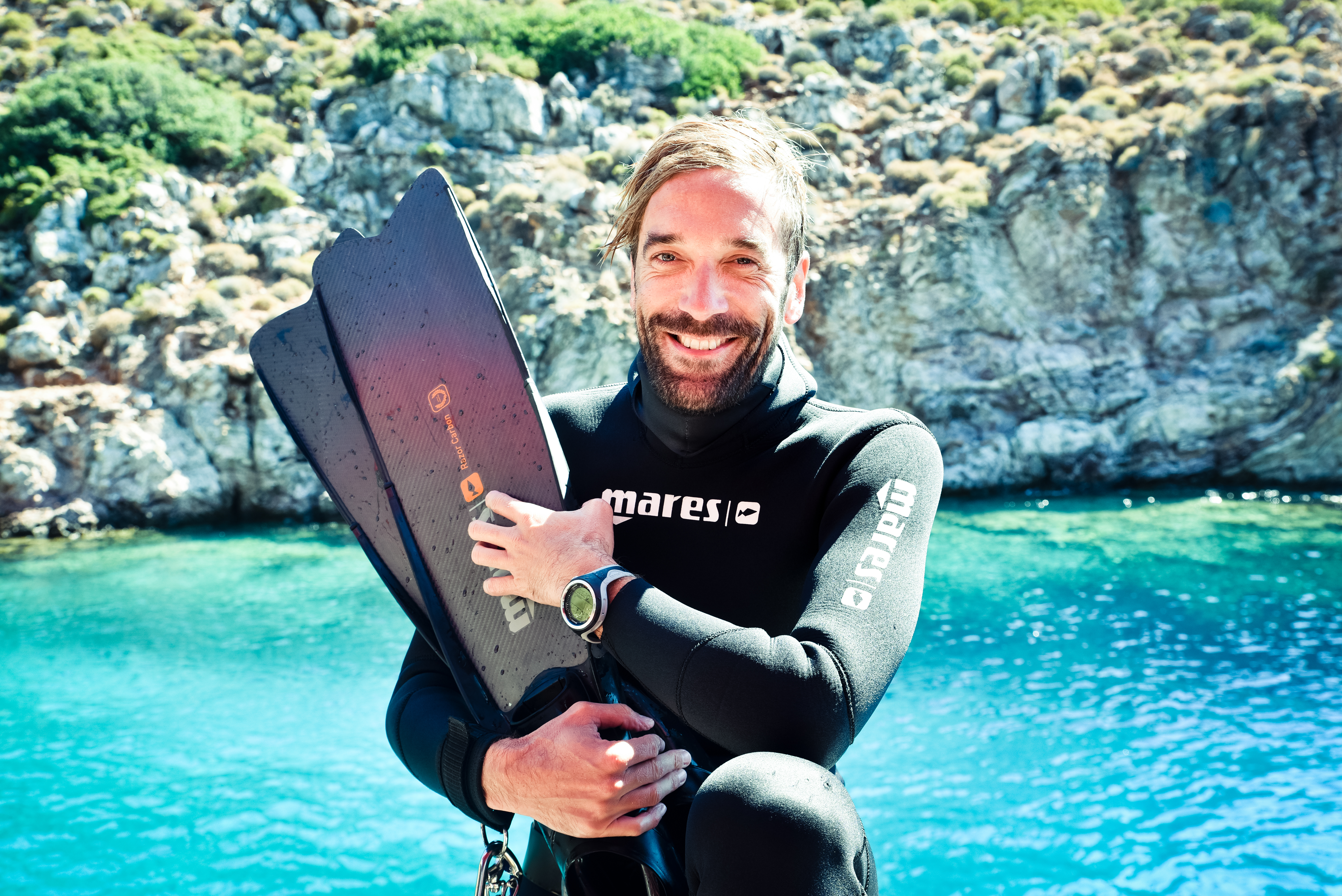 Nik Linder in der Türkei (2016)